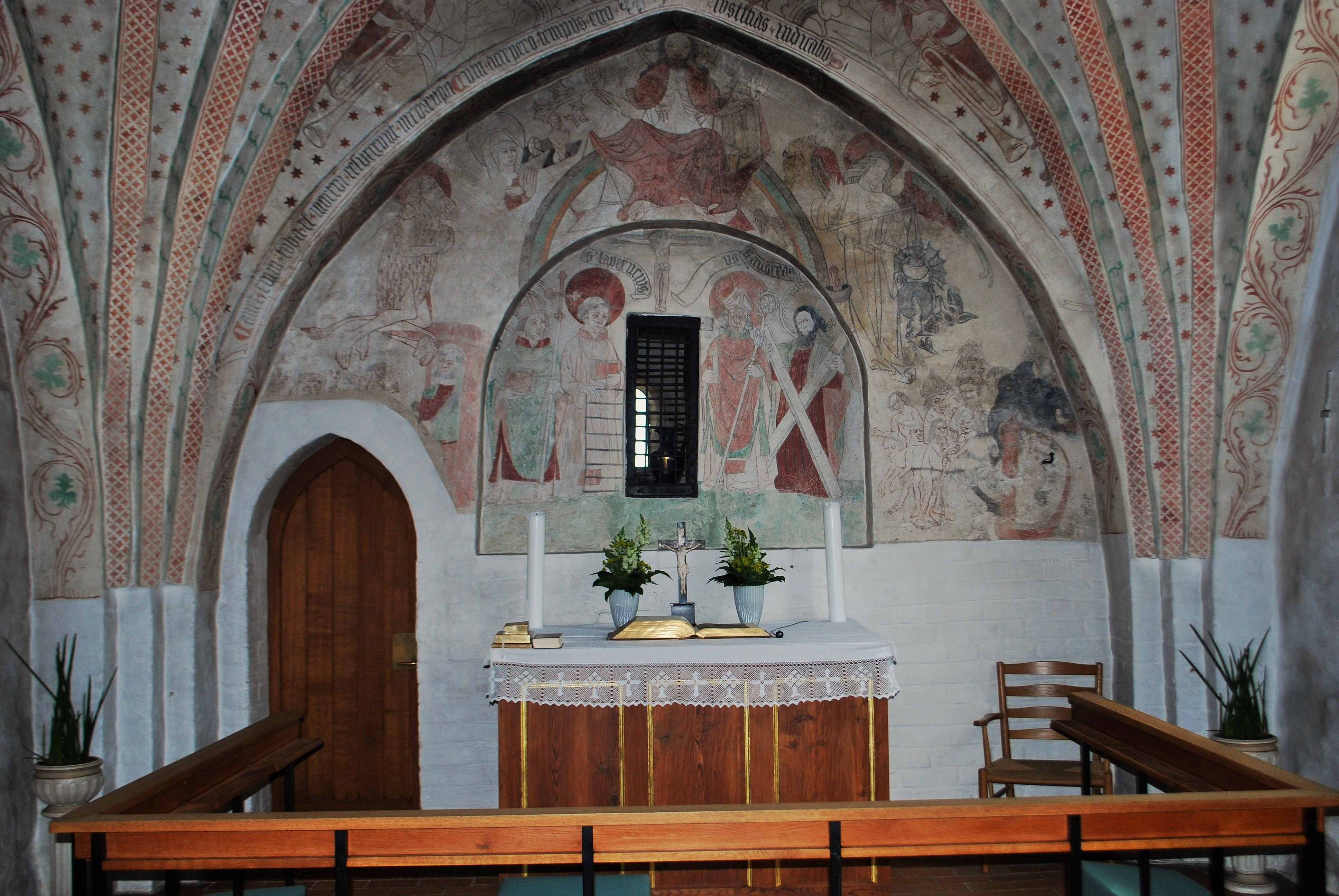 Alteret i Jetsmark Kirke, Pandrup.